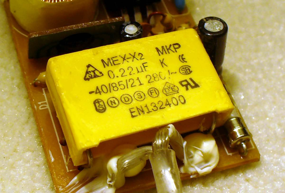 Entstörkondensator